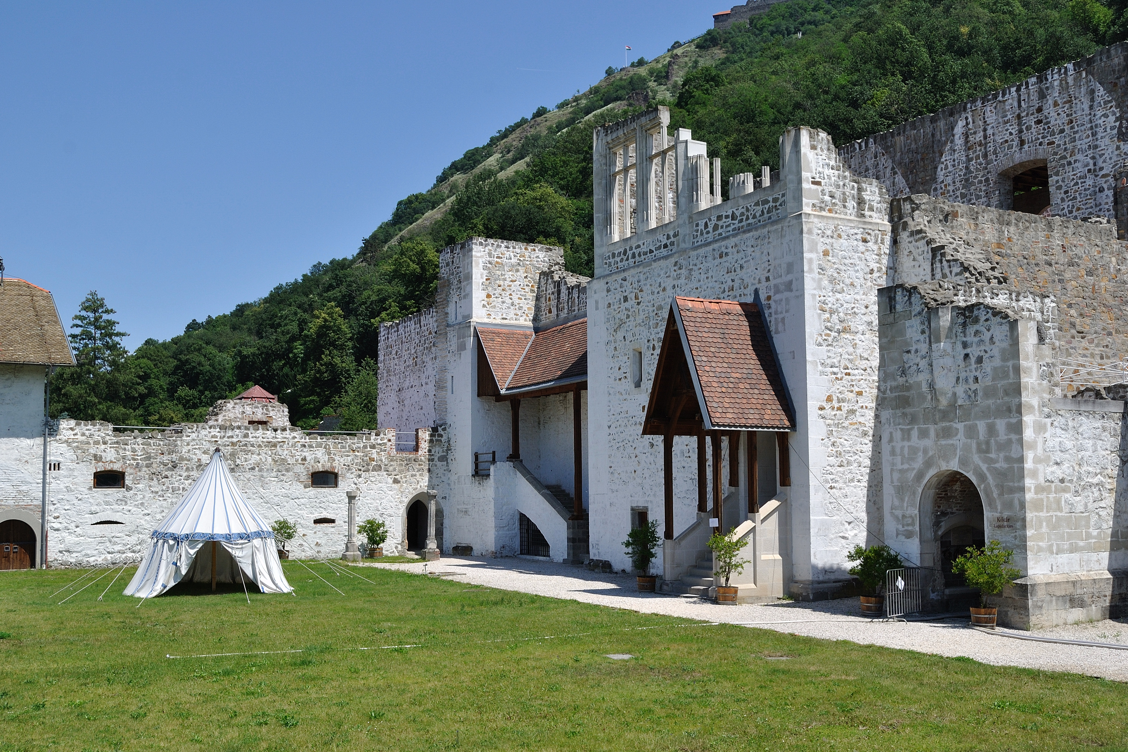 a királyi palota teljes romterülete This is a photo of a monument in Hungary. Identifier: 91325